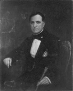 Obra da coleção Brasiliana Iconográfica.